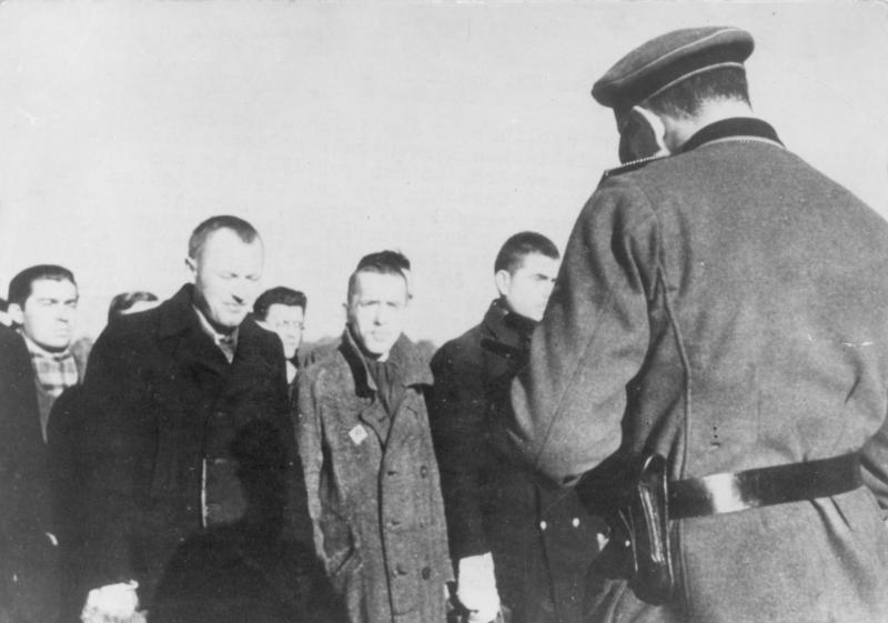 Zentralbild 9.12.1960 Zur Einweihung der Mahn- und Gedenkstätte Sachsenhausen am 23. April 1961. - Vor den Toren Berlins, auf dem Gelände des ehemaligen faschistischen Konzentrationslagers Sachsenhausen bei Oranienburg, in das von 1936 bis Kriegsende 200.000 Menschen verschleppt wurden, entsteht - wie in Buchenwald und Ravensbrück - eine würdige Mahn- und Gedenkstätte. Jeder Quadratmeter Boden ist hier vom Blut der 100.000 Toten durchtränkt, die im KZ Sachsenhausen mit seinen 73 aussenkommandos erschlagen, erhängt, erschossen, zu Tode geprügelt, durch erbarmunslose Sklavenarbeit zu Grunde gerichtet und vergast wurden. Doch gelang es den SS-Mördern nicht, den Widerstandswillen der politischen Häftlinge zu brechen. So wurde Sachsenhausen auch zur Stätte der großen internationalen Solidarität und des mutigen Kampfes gegen Faschismus und Krieg. UBz: Einlieferung von polnischen Widerstandskämpfern. Im Vordergrund einer der berüchtigten SS-Banditen von der sogenannten "Politischen Abteilung" der Gestapo des Lagers, SS-Scharführer Eilers. (Aufnahme wurde bei SS-Banditen gefunden.)